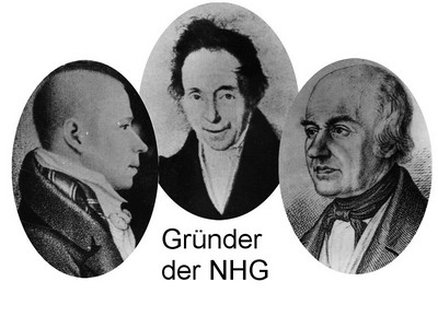 Gründer der Naturhistorischen Gesellschaft Nürnberg e.V.